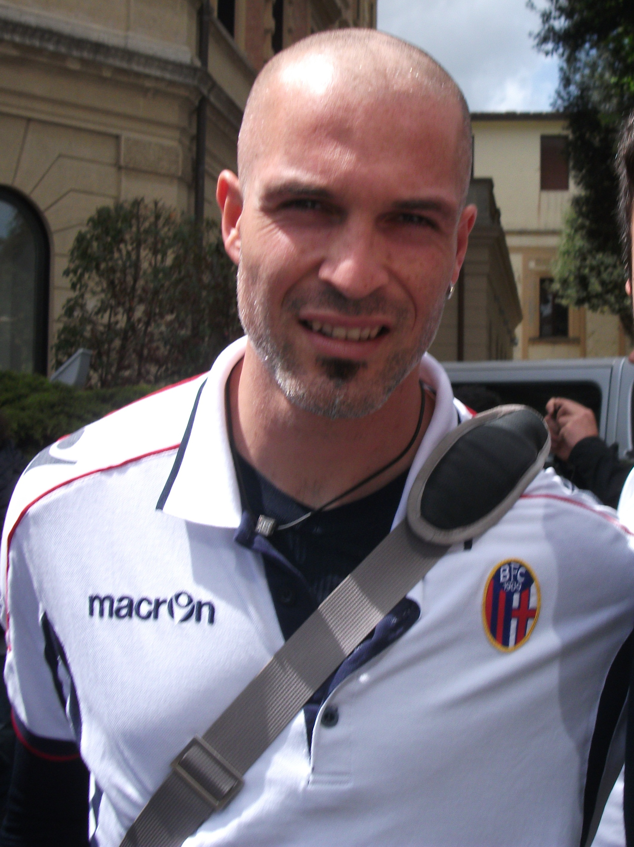 Il calciatore italiano Andrea Raggi prima della partita di Serie A 2011-12, Siena vs Bologna, 25 aprile 2012.